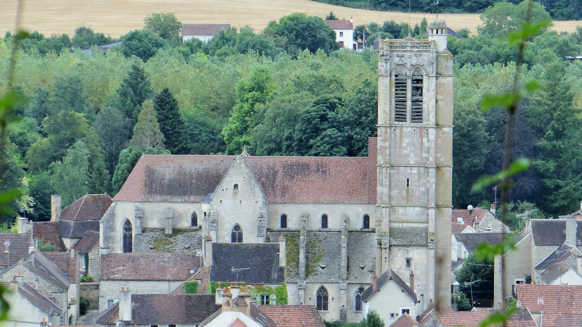 Église de Noyers-sur-Serein vue du vieux château de Noyers-sur-Serein .